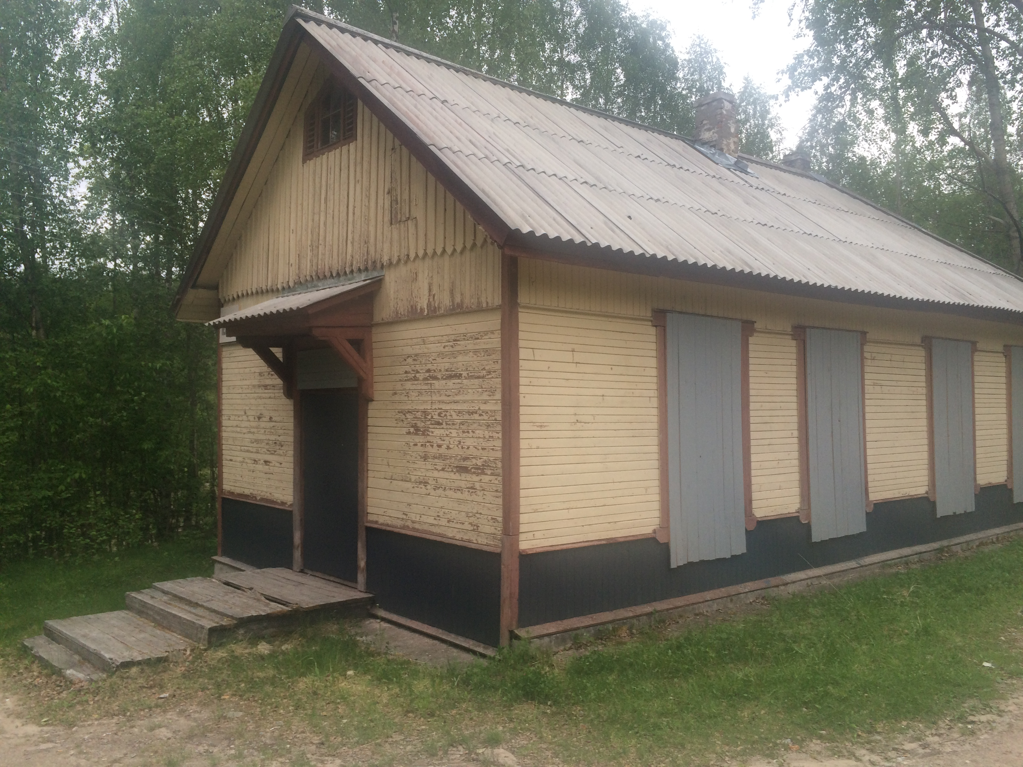 ст. Лендеры